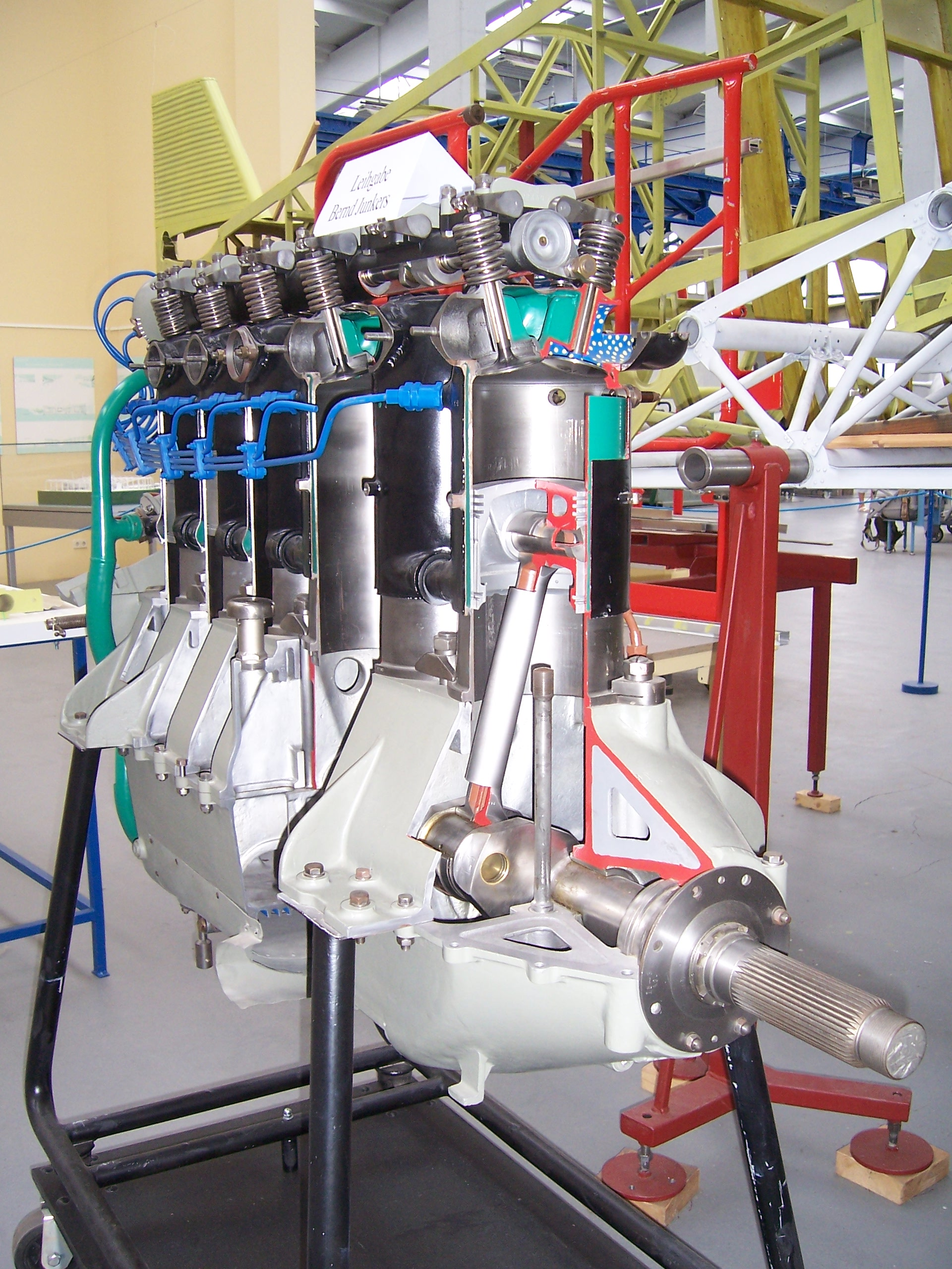 Junkers L 5 im Technikmuseum Hugo Junkers Dessau 2010-08-06